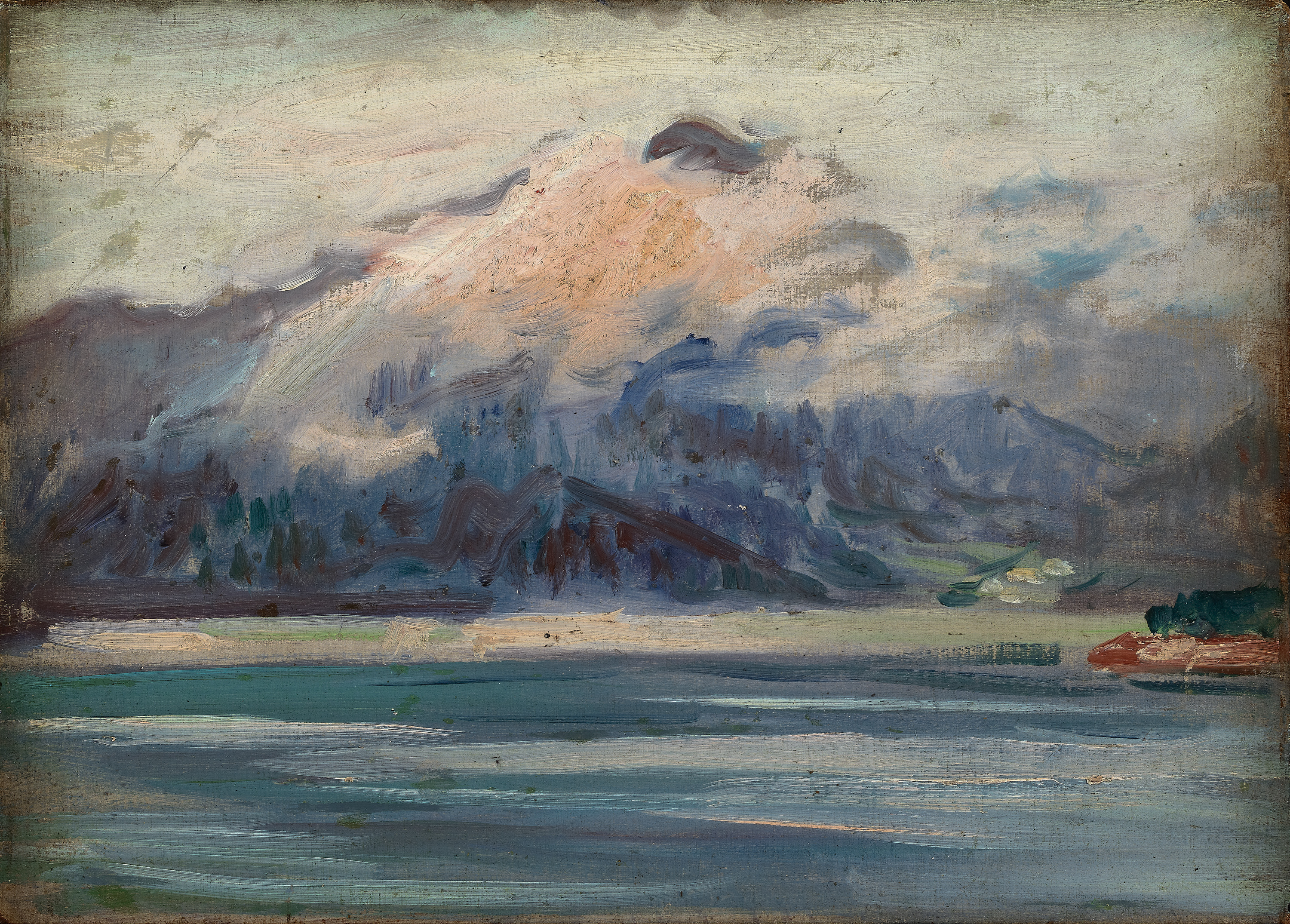 中文（台灣）: 李梅樹作品：日月潭，創作時間不詳，油彩。 這幅作品是寫生日月潭景色。當時還有潭中島可上岸遊走。原名拉魯島後改為光華島。因921地震及水位波浪影響逐漸消失。李梅樹以畫筆留下當年的景象。彩雲飄過遠山反映潭面。 本畫雖未署名、且尚未完成，但已經是完整的畫作。